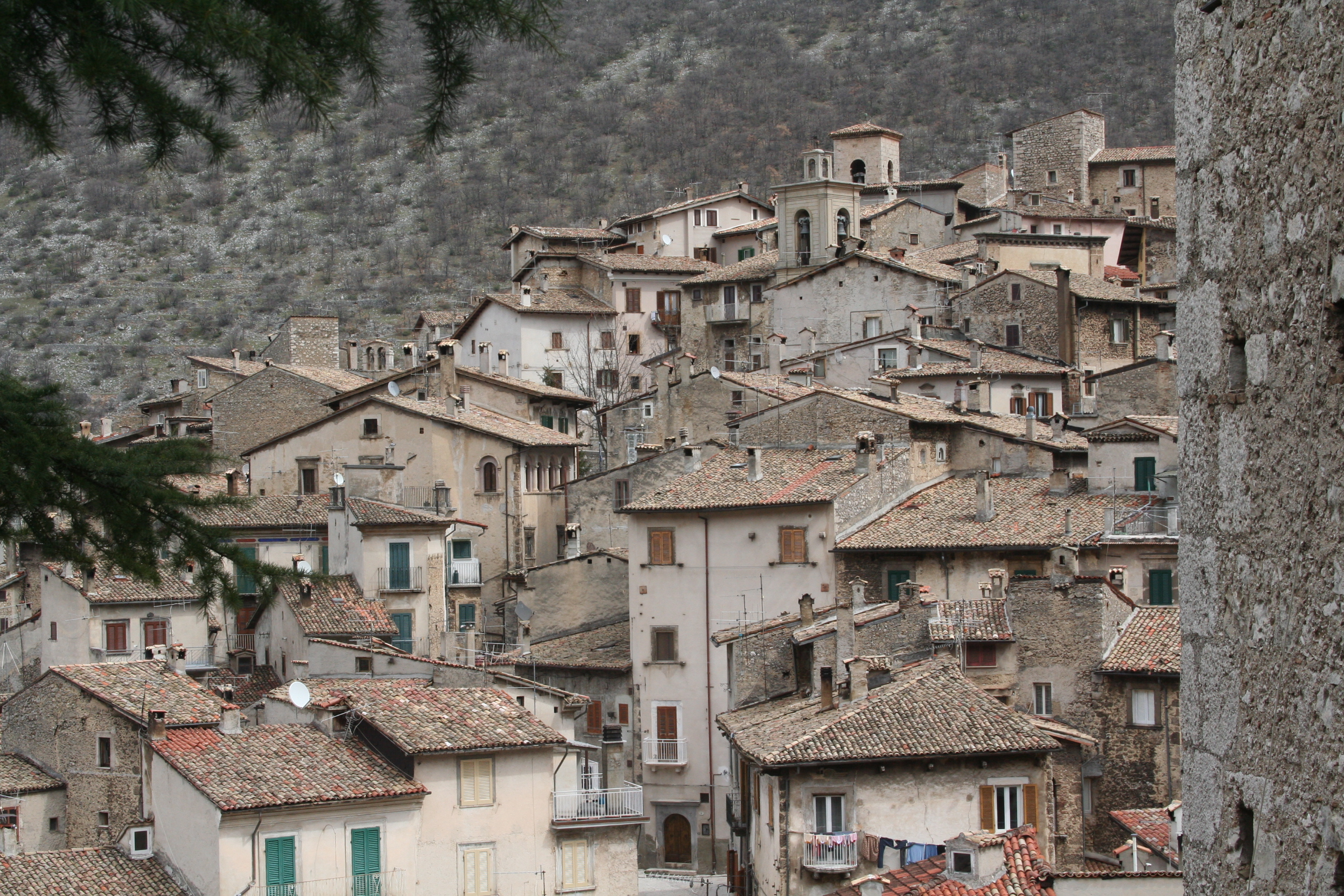 Scanno